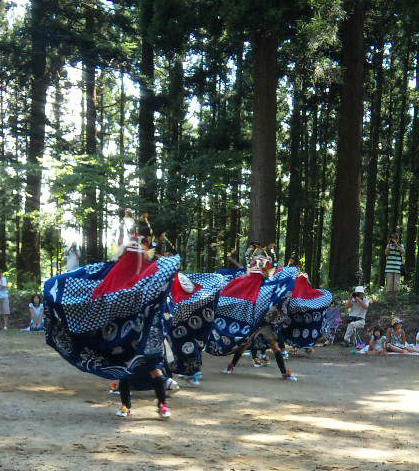 Représentation de la Danse Principale à Fujishima